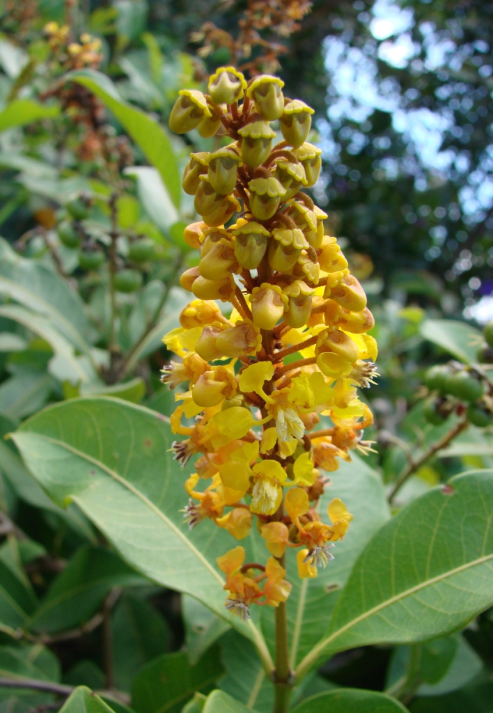 Byrsonima intermedia - MALPIGHIACEAE Cachoeira do Tororó - Brasília - Distrito Federal - Brasil.